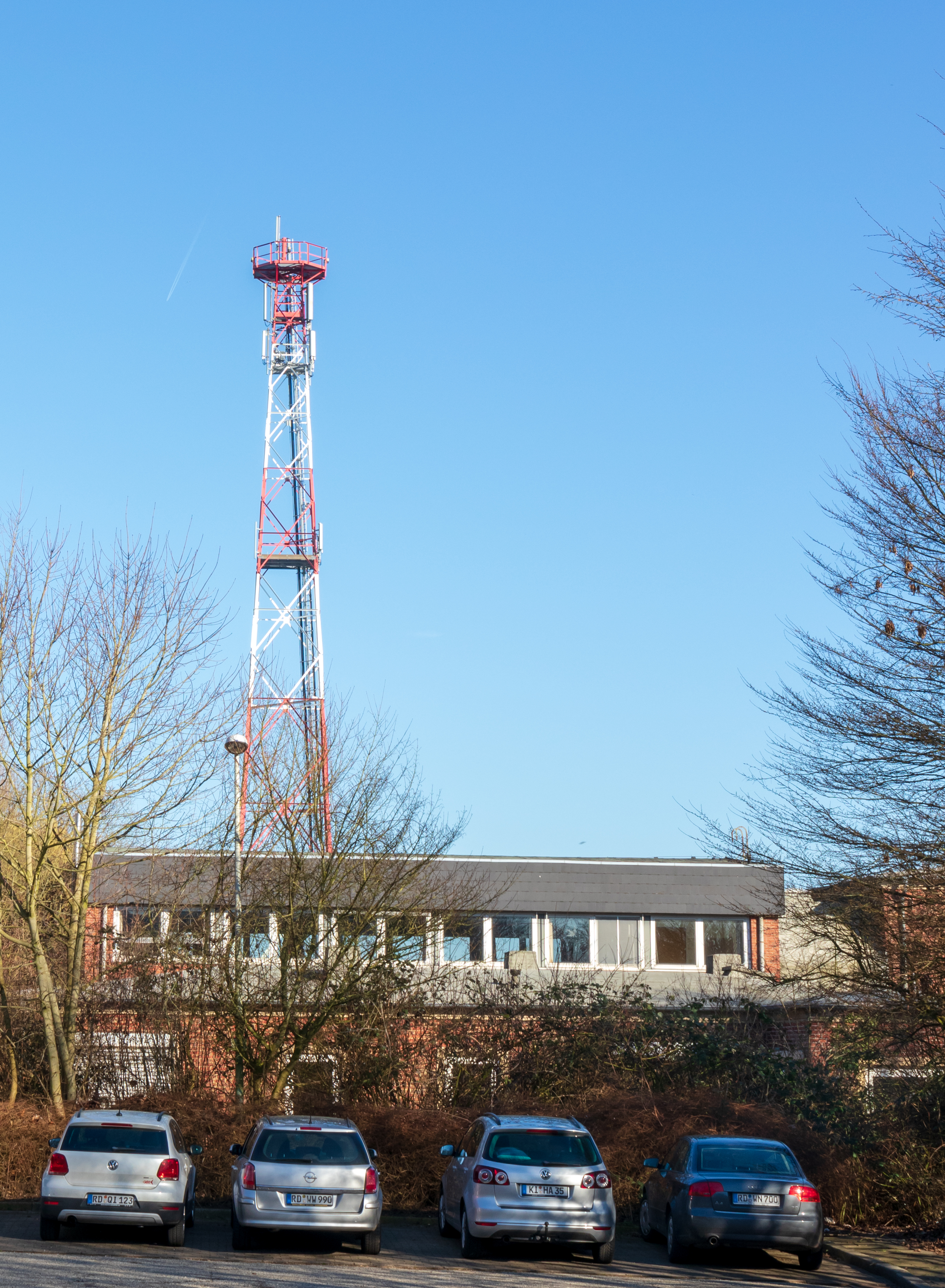 Kiel Radio- Empfangsturm Kiel-Schilksee